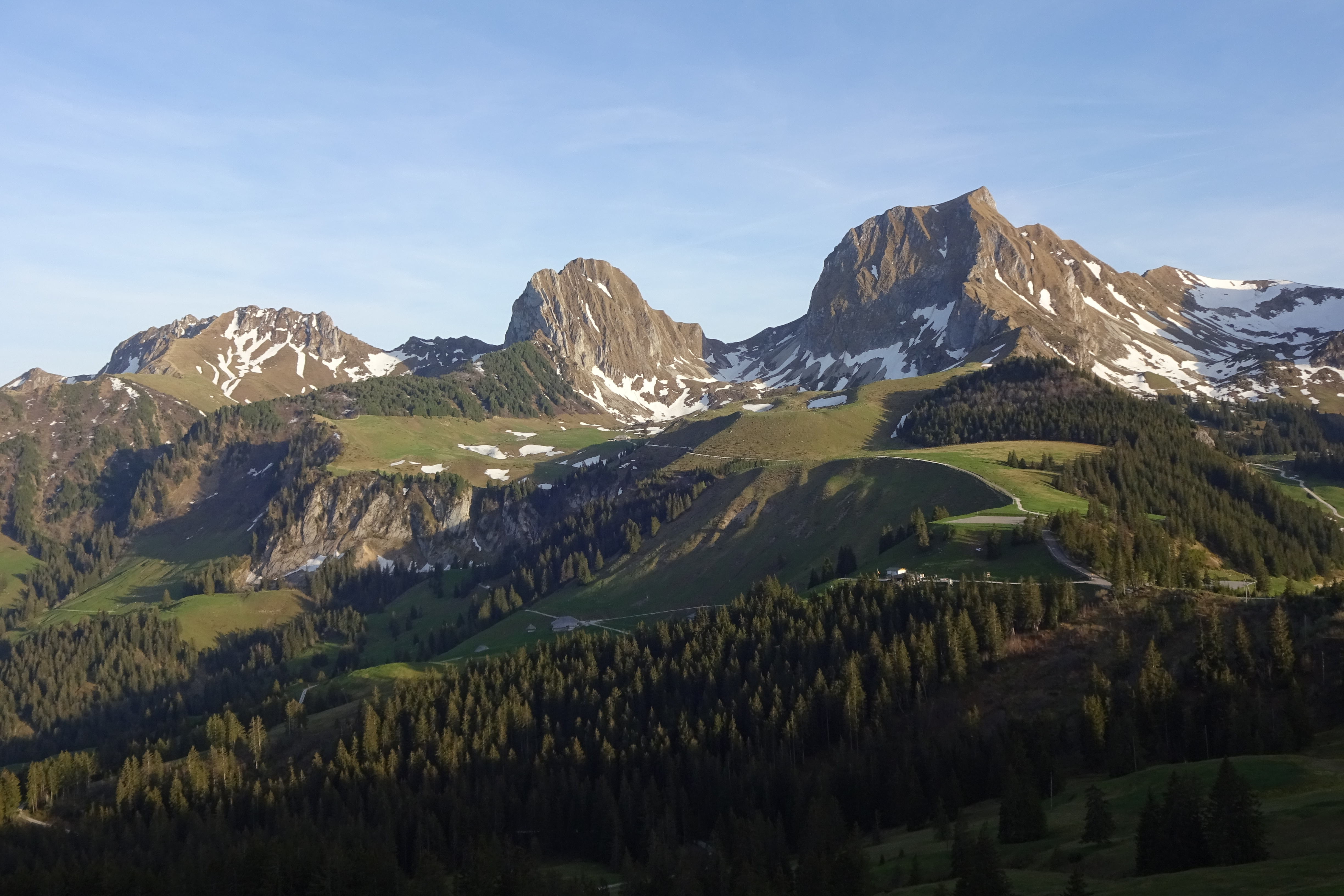 Naturpark Gantrisch (Nr. 1011P) – Gantrischkette von Norden: Krummfadenfluh (links), Nünenenfluh (Mitte) & Gantrisch (rechts) _ Aufnahmestandort: Rüeggisberg (Exklave Nünenenalp), Gurnigel Stierenberg/Wasserscheide, am Selibühl-Rundweg – 46°43'49.24" N / 7°26'36.64" O